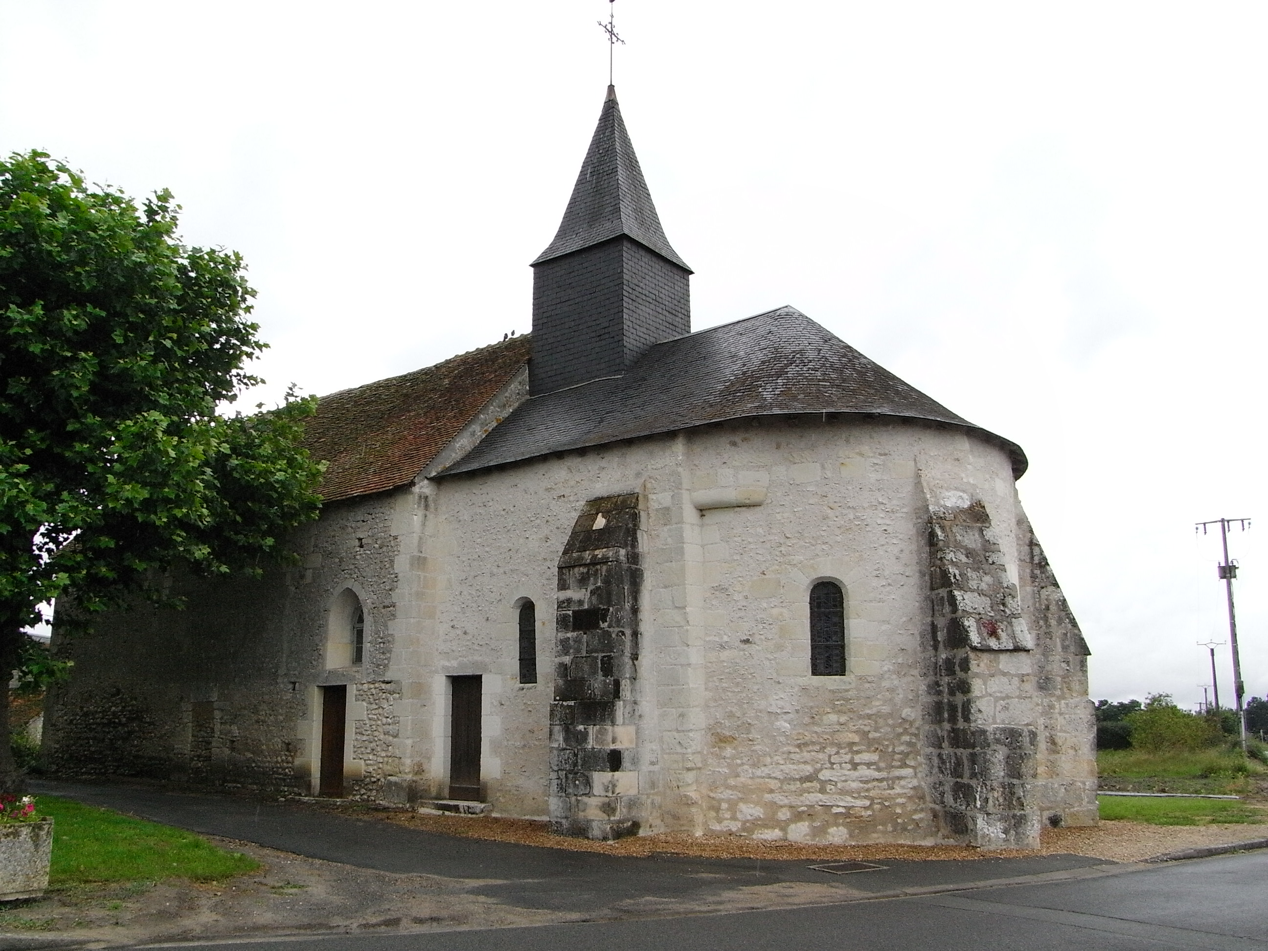 Église romane du XIIe siècle, désaffectée et transformée en grange au XIXe siècle (monument historique)